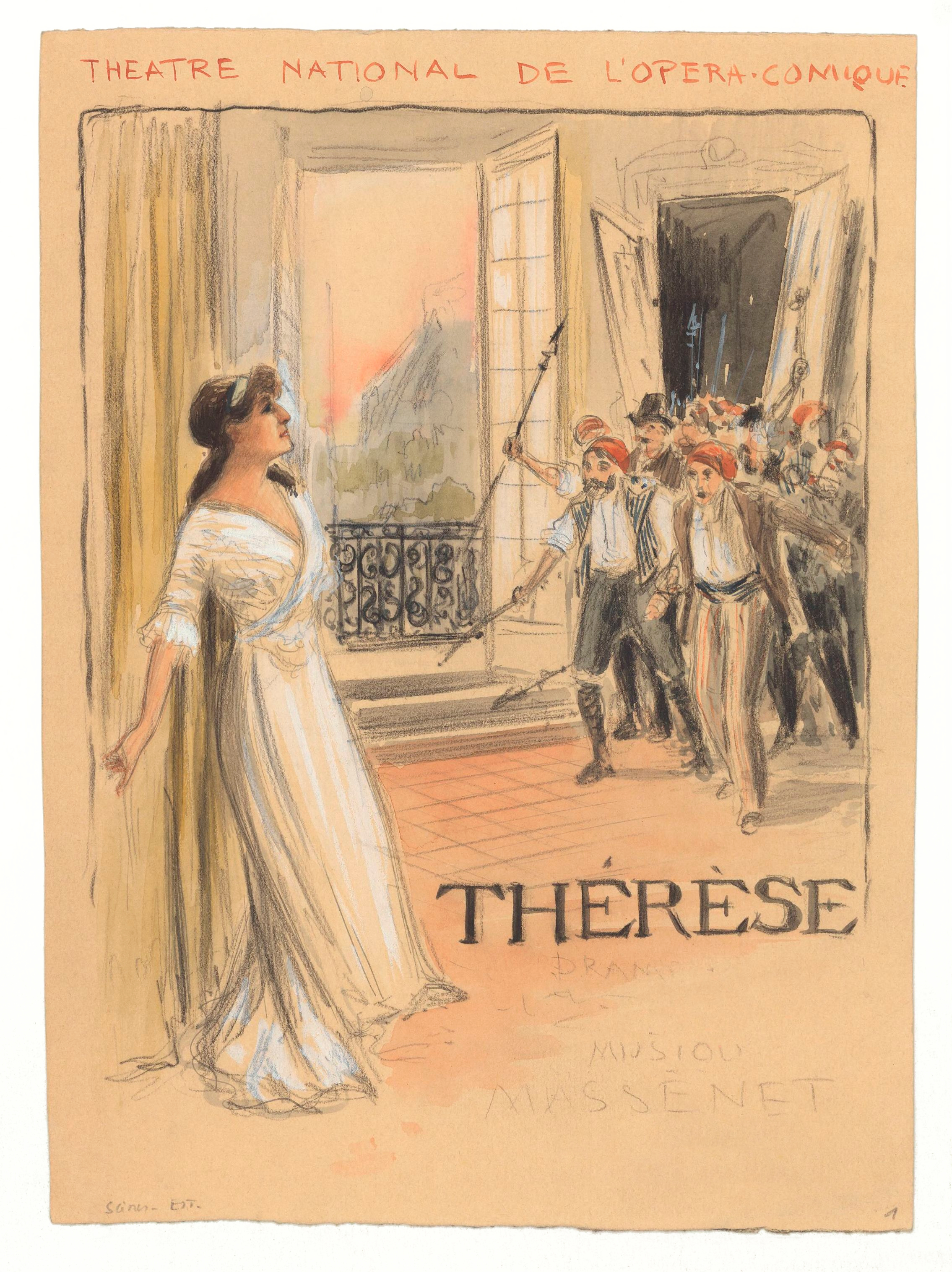 "Théâtre national de l'Opéra-Comique, Thérèse, drame [musical], musique [de] Massenet : [Lucy Arbell] : enquête, R. Chavagnes" - Poster design for the Paris première of Jules Massenet's Thérèse, featuring Lucy Arbell as Thérèse. It's not clear what R. Chavagnes (presumably journalist René Chavagnes) had to do with it, possibly he compiled a directory of images held.